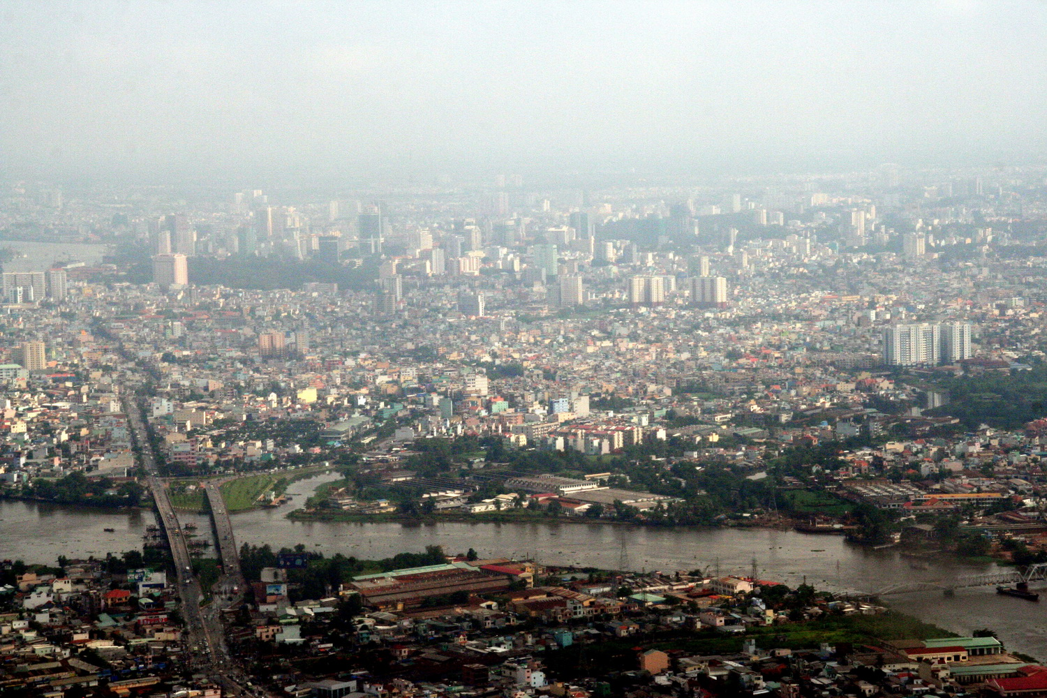 Saigon vu depuis un avion en atterrissage